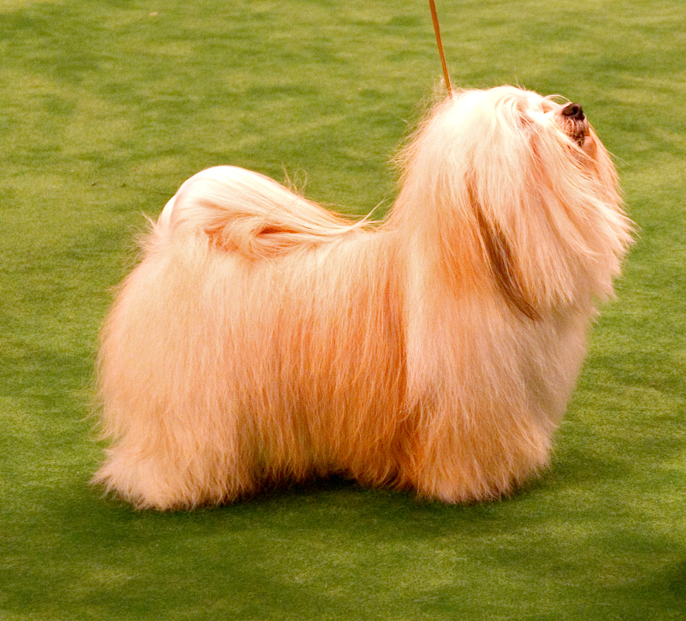 Bichon Havanais